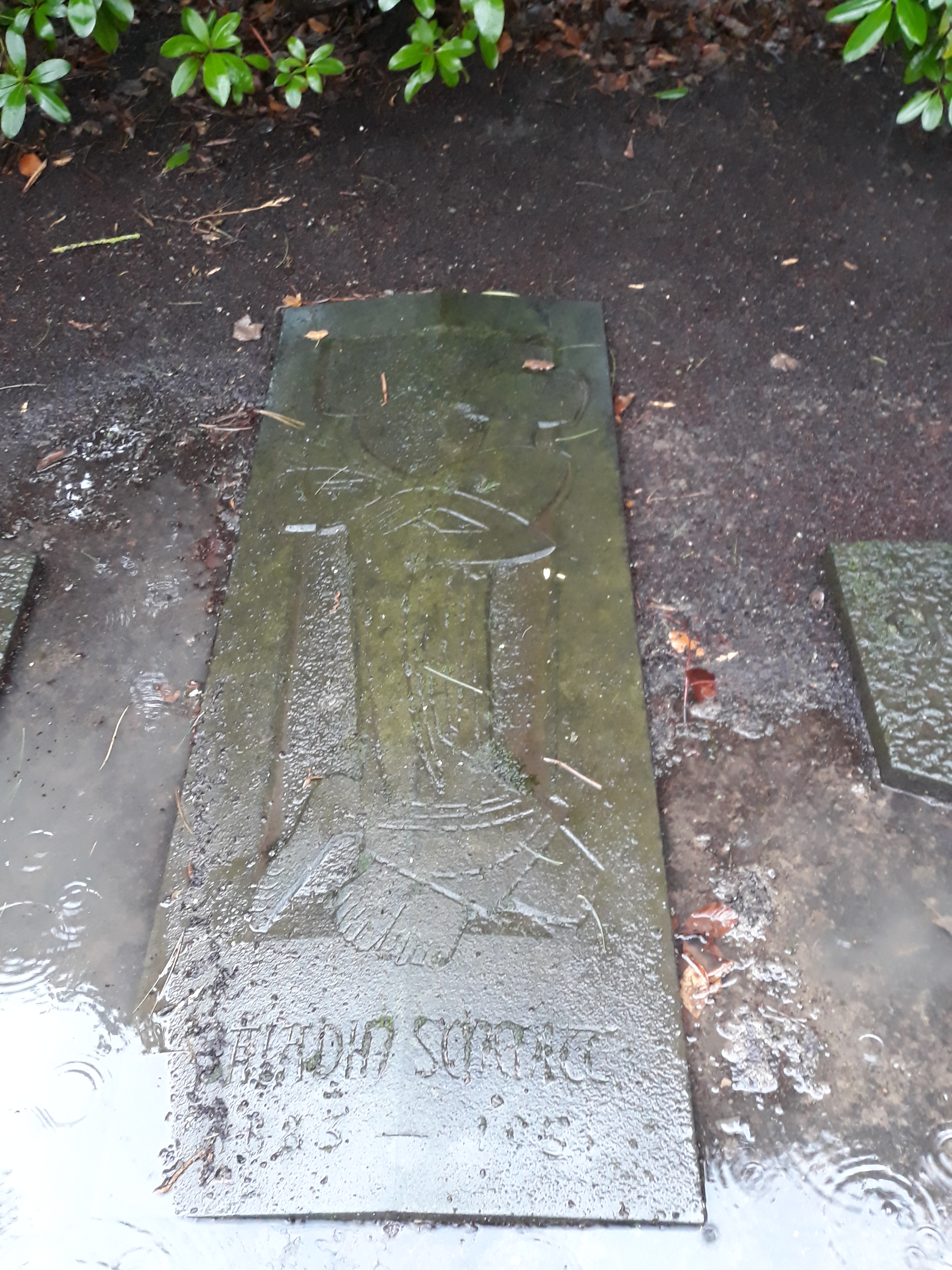 Das Grab des deutschen Regisseurs Saladin Schmitt auf dem Friedhof Blumenstraße in Bochum.